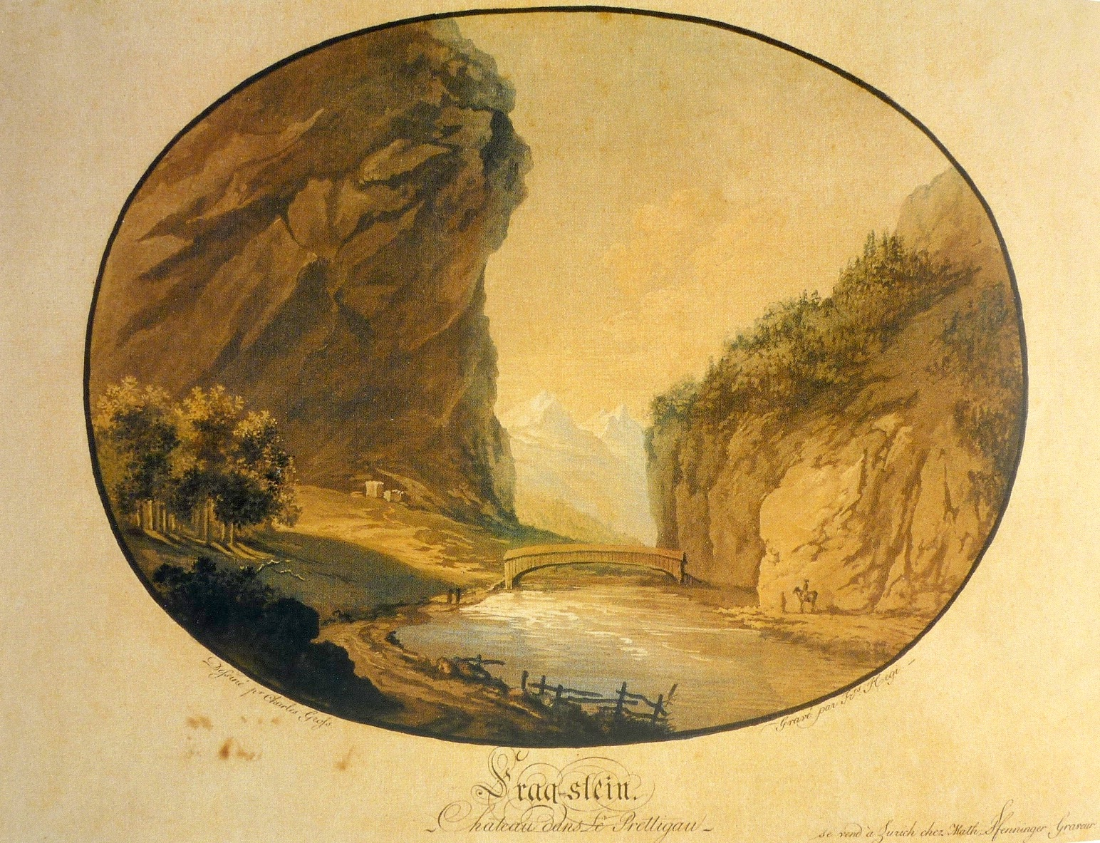 Klus (Prättigau), Aquatinta von Carl Gotthard Grass (1767-1814) und Franz Hegi (1774-1850). Links hinten die Burg Frakstein